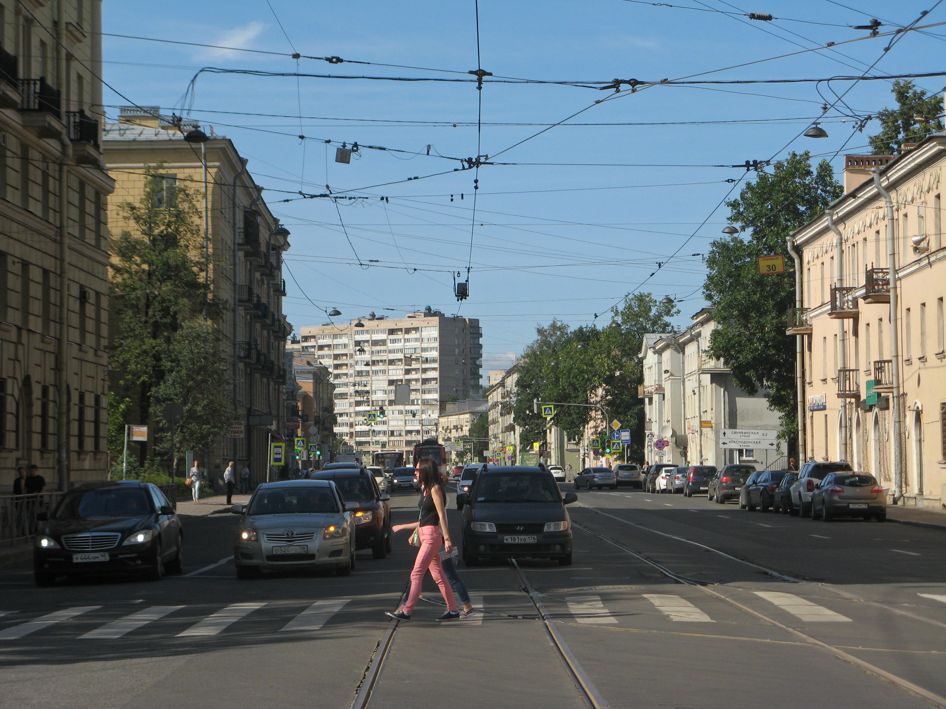 Среднеохтинский проспект в Санкт-Петербурге